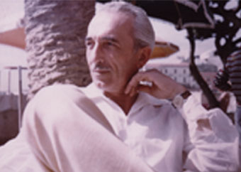 Giambattista Vicari